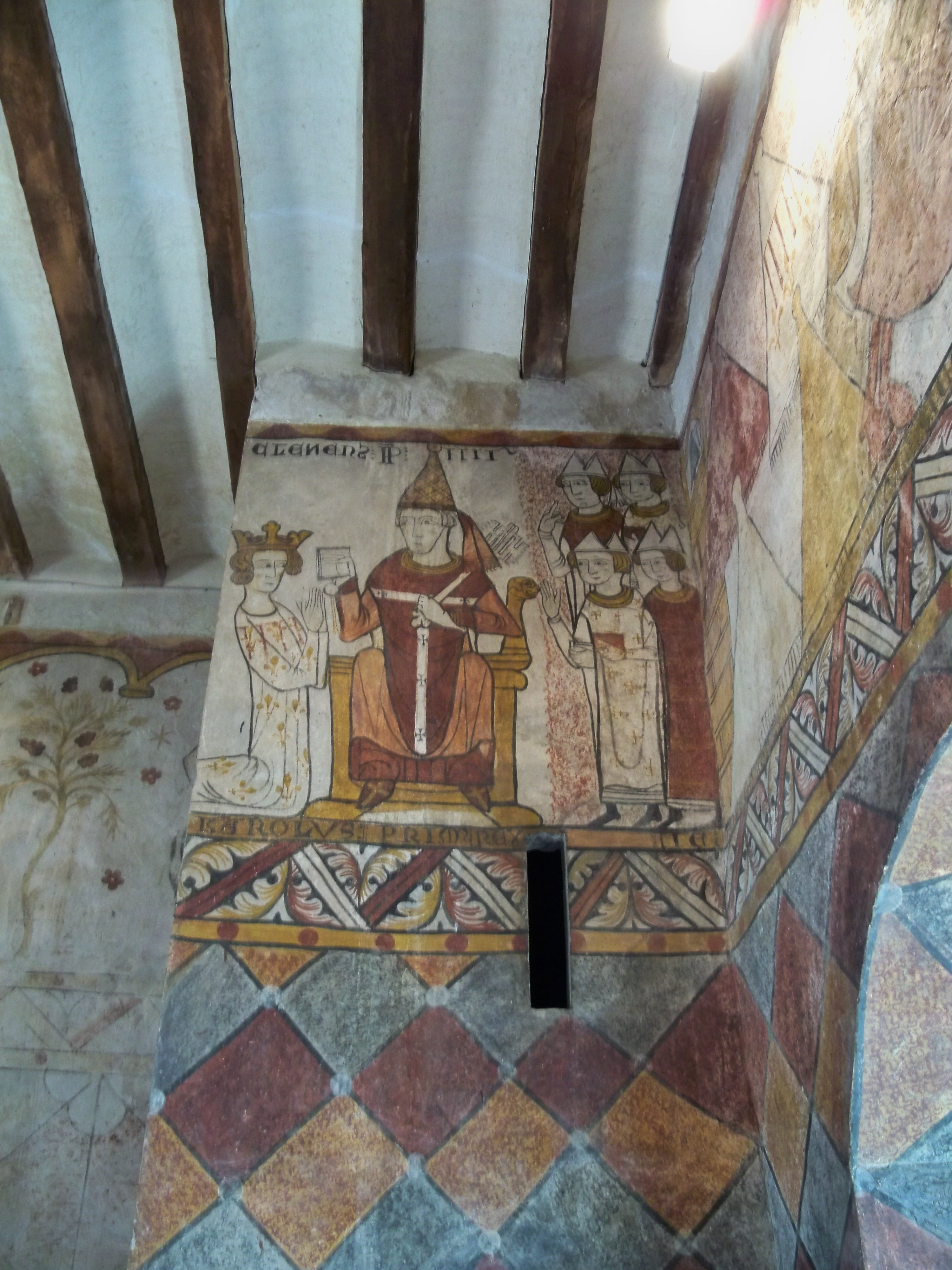 fresques de la Tour Ferrande à Pernes les Fontaines, Vauccluse, France